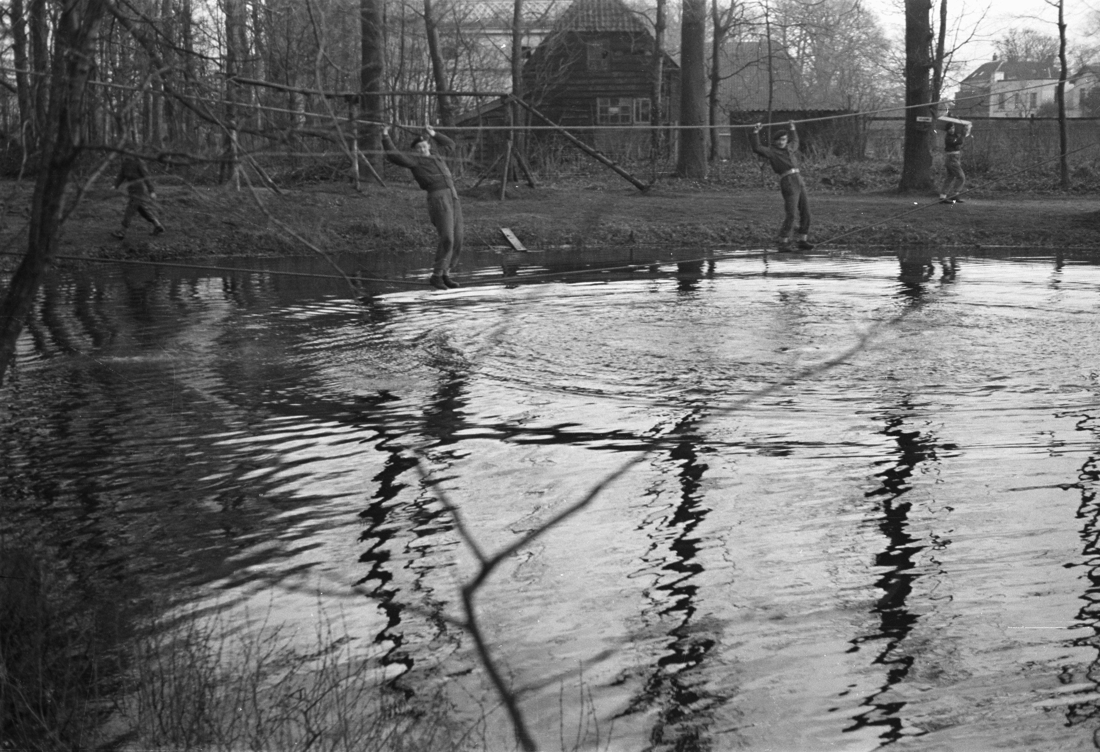 Collectie / Archief : Fotocollectie Anefo Reportage / Serie : [ onbekend ] Beschrijving : Militair opleidingskamp te Bloemendaal (bezoek Generaal Kruls) Datum : 25 februari 1946 Locatie : Bloemendaal, Noord-Holland Trefwoorden : bezoeken, leger, miltairen, opleidingskampen Persoonsnaam : Kruls, H.J. Fotograaf : Dudok van Heel, Jack / Anefo Auteursrechthebbende : Nationaal Archief Materiaalsoort : Negatief (zwart/wit) Nummer archiefinventaris : bekijk toegang 2.24.01.05 Bestanddeelnummer : 901-5131